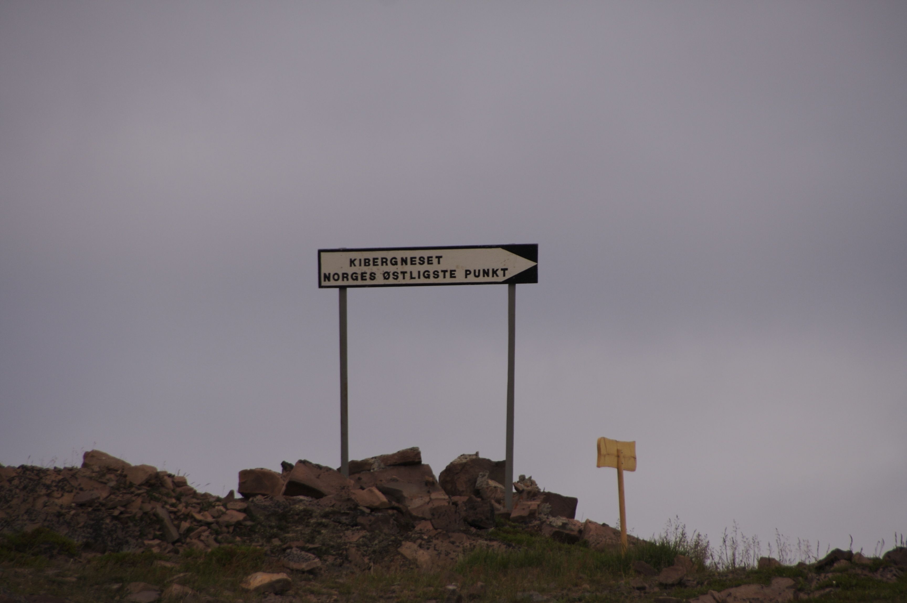 Kibergnesetskilt